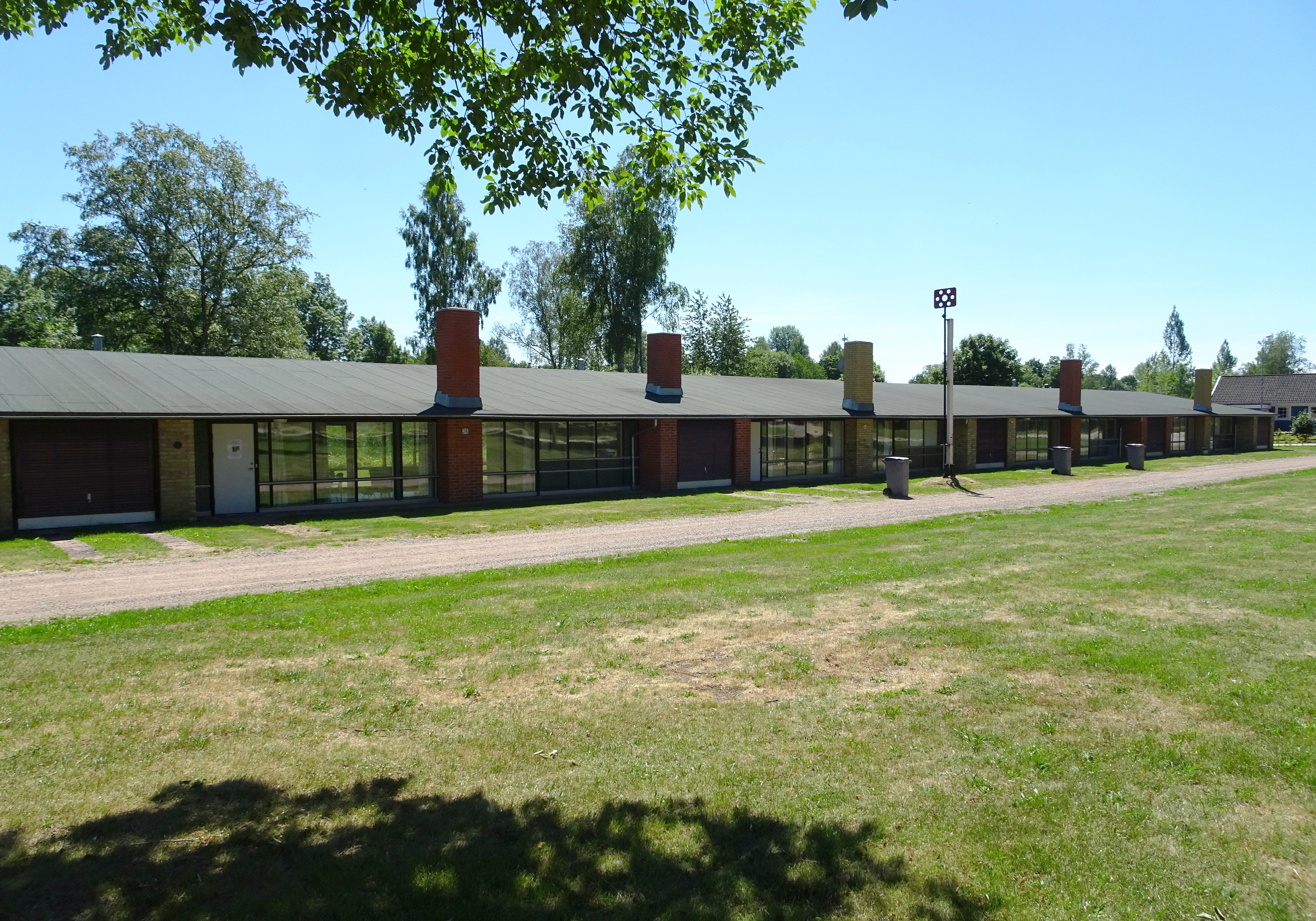 Kosta glashus arkitekt Bruno Mathsson